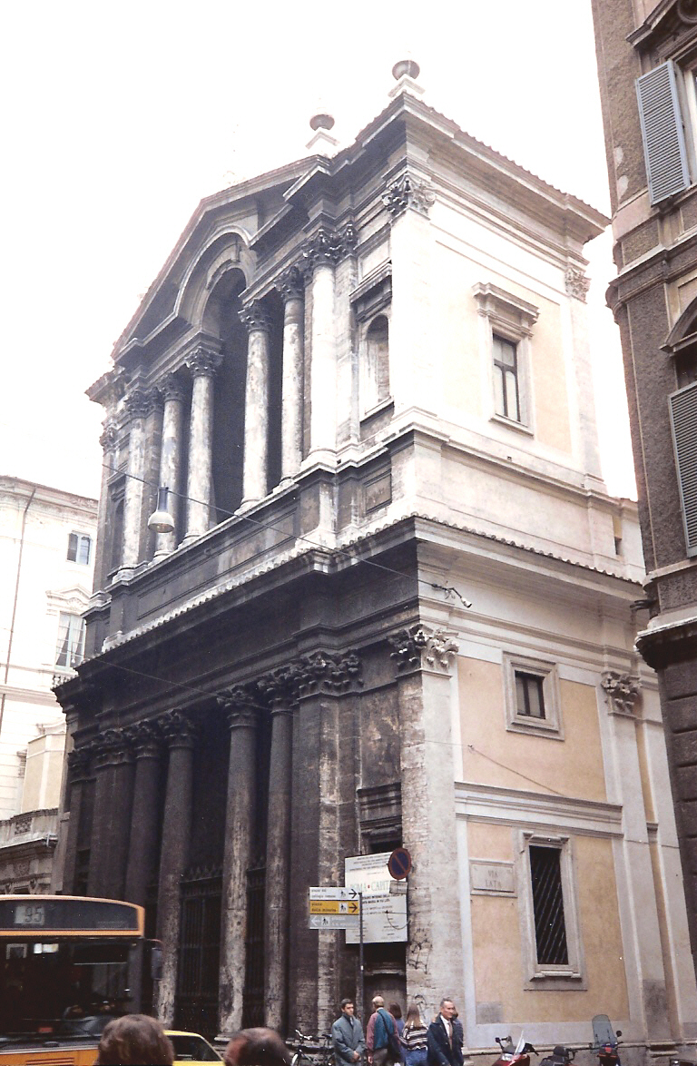 Chiesa di Santa Maria in Via Lata, Roma. Facciata di Pietro da Cortona. Picture by Torvindus.